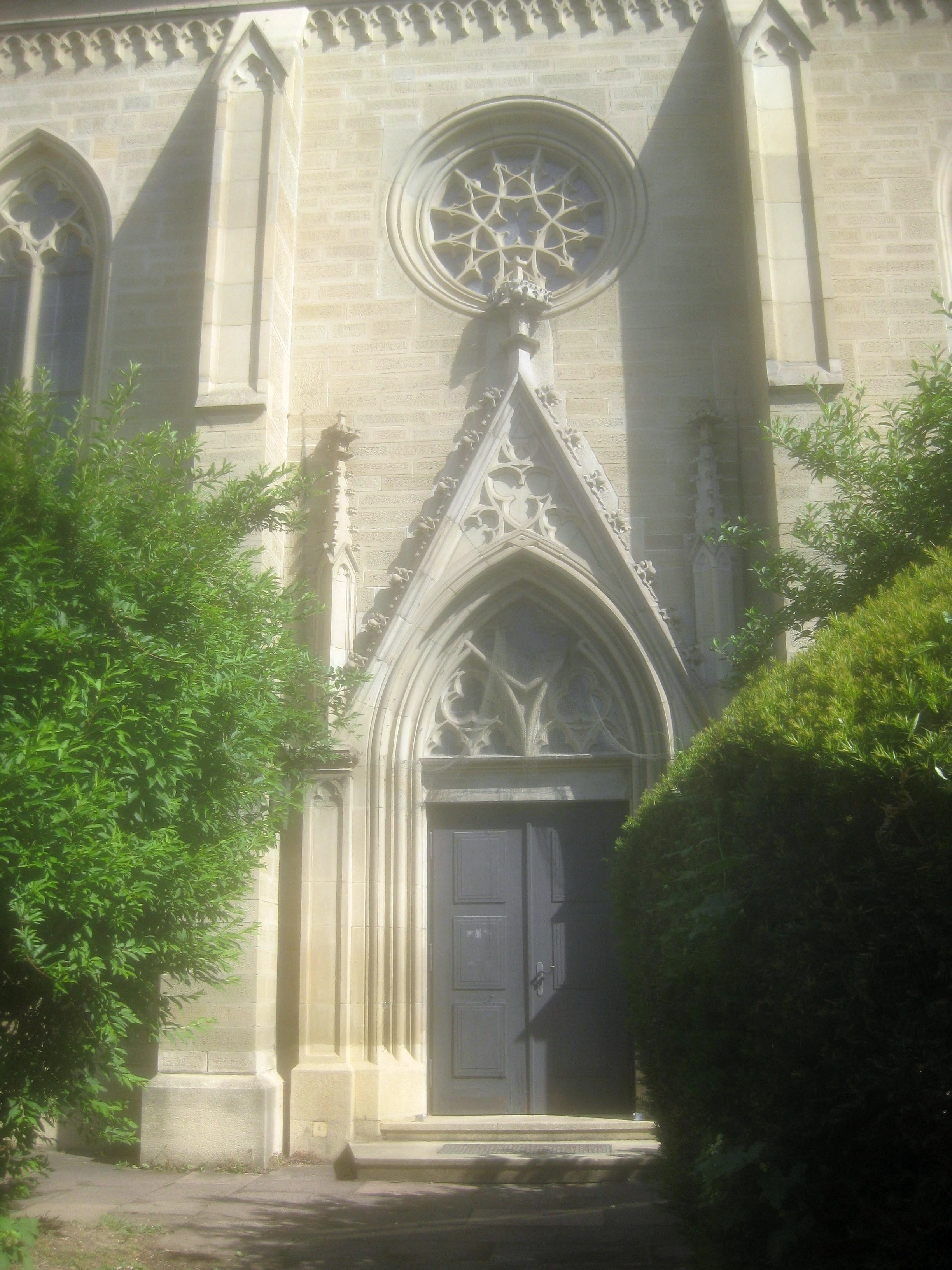 Südportal der Berger Kirche in Stuttgart-Berg.